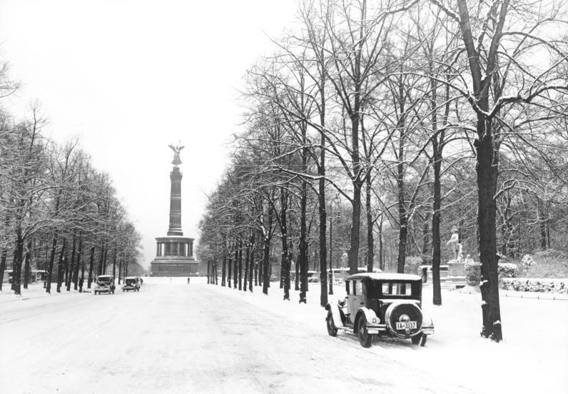 Berlin im Schnee! Blick in die verschneite Siegesallee nach dem ersten grossen Schneefall in Berlin.